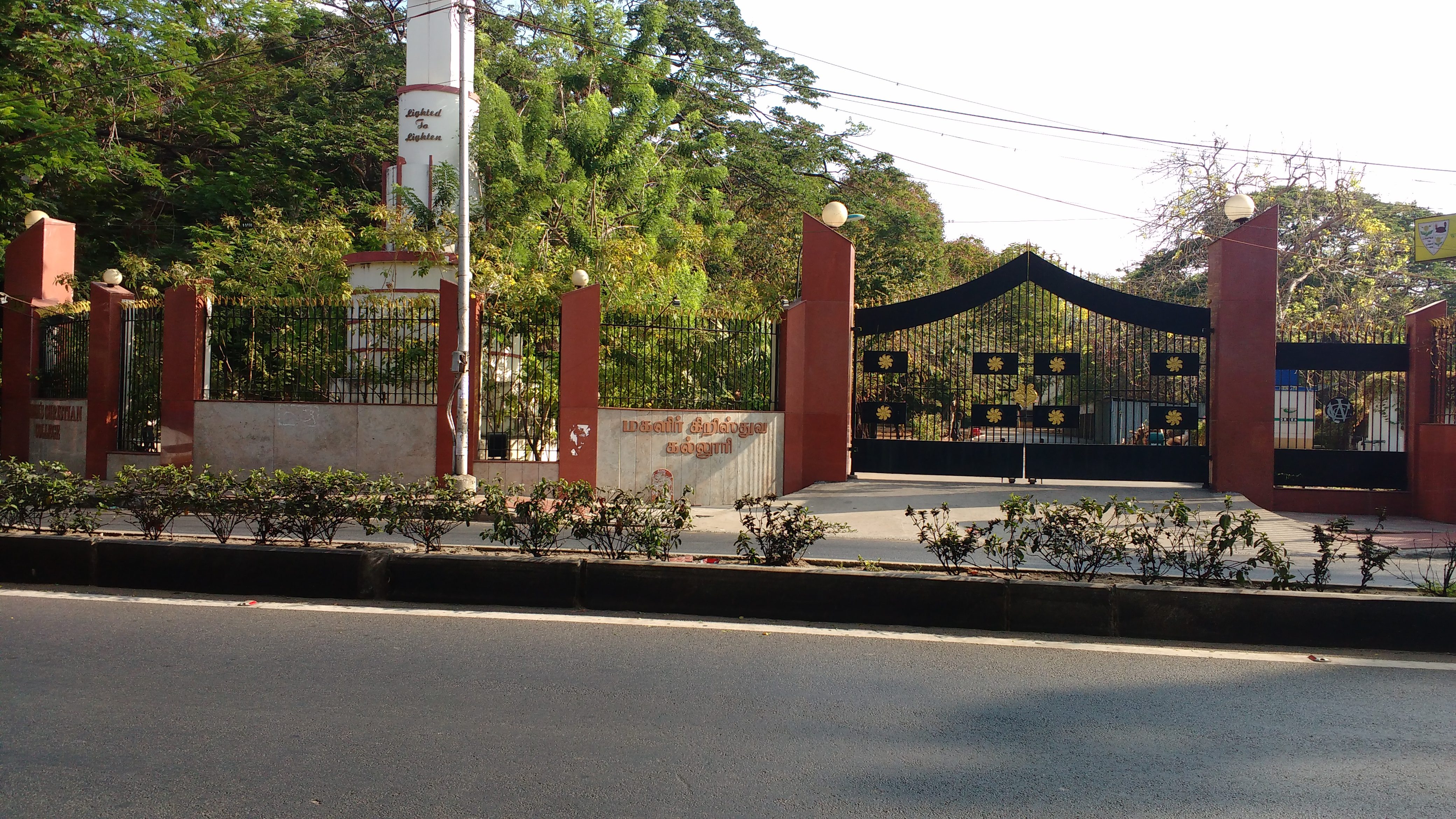 மகளிர் கிறித்துவக் கல்லூரி